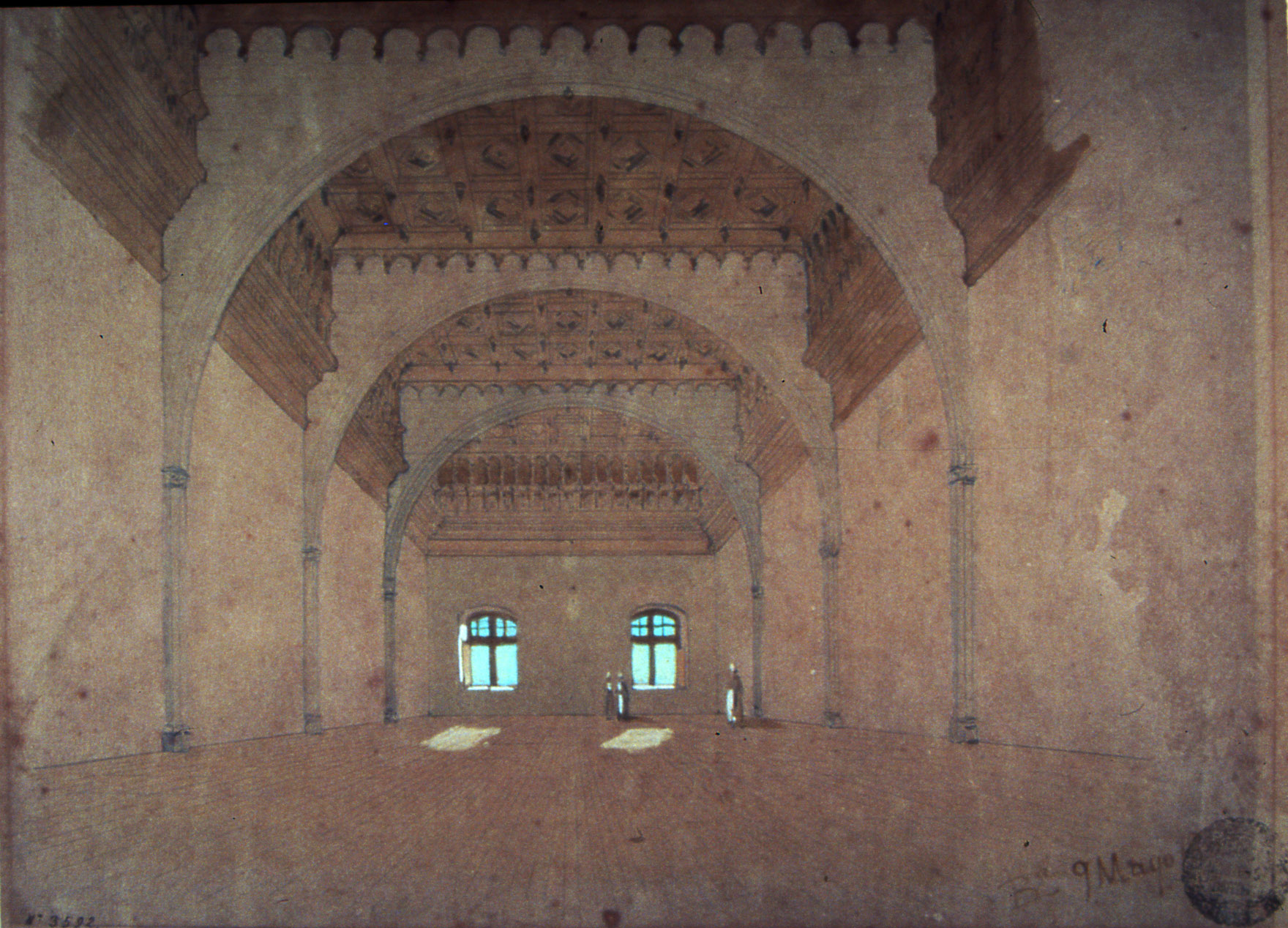 Barcelona, Palau del Temple, "sala dels cavalls" (Arxiu Municipal de la ciutat)